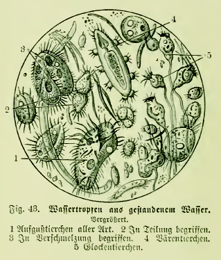 Fig. 43. Wassertropfen aus gestandenem Wasser. Vergrößert. 1 Aufgußtierchen aller Art. 2 Zu Teilung begriffen. 3 Zu Verschmelzung begriffen. 4 Bärentierchen. 5 Glockentierchen.